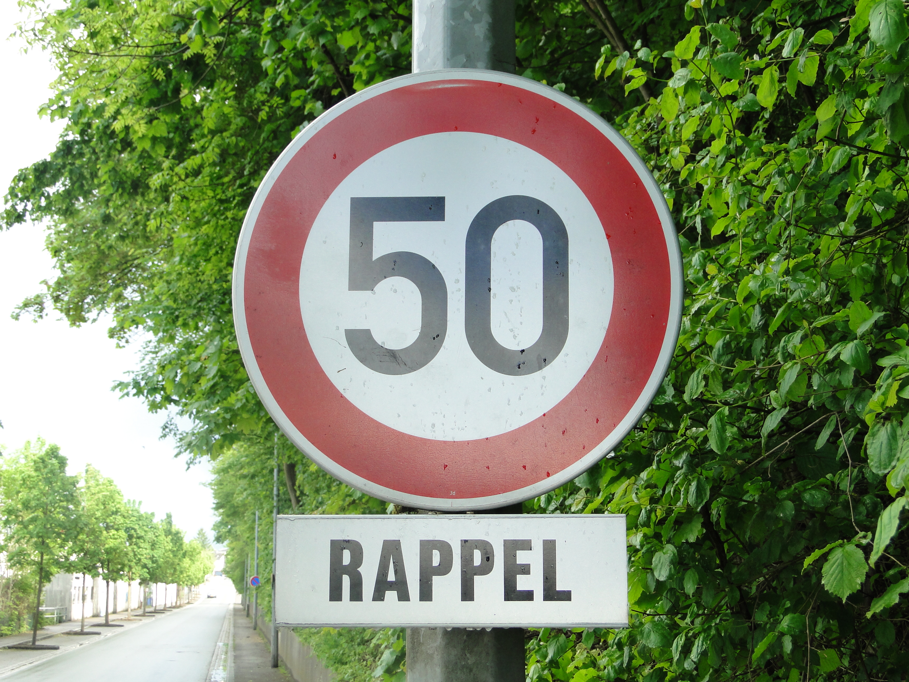 Verkéiersschëld C,14 "Limitation de vitesse" aus dem lëtzebuerger Code de la Route mam Zousazschëld Modell 3e.